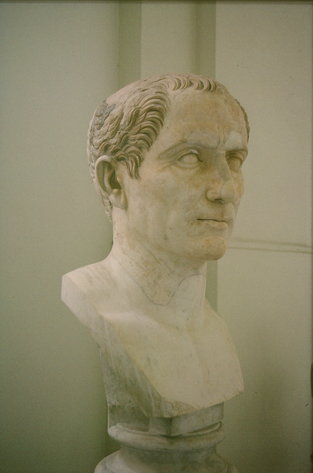 Die Büste von Gaius Julius Caesar im Archäologischen Nationalmuseum, Napoli Fotografiert von Andreas Wahra im März 1997